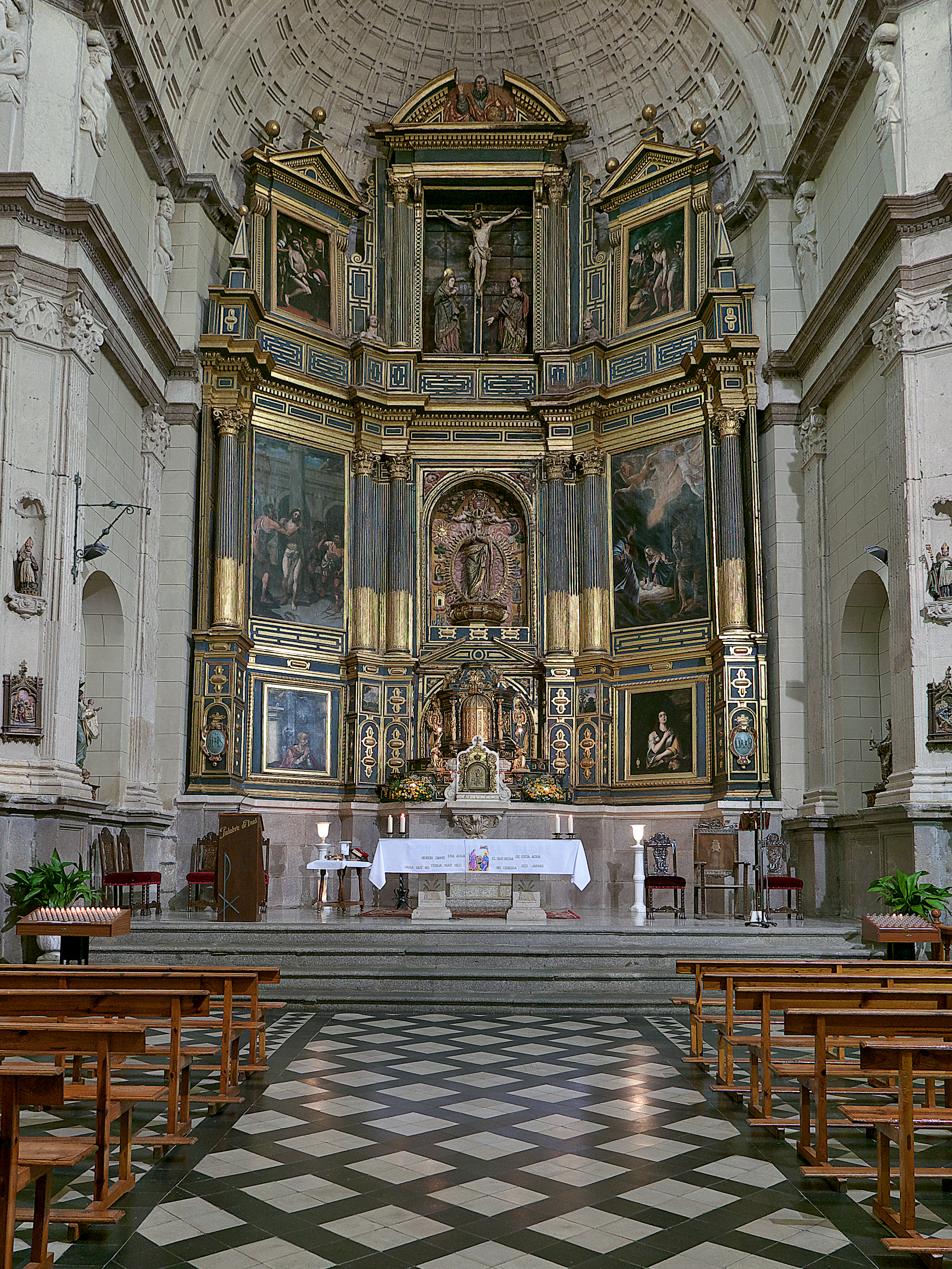 Interesante retablo renacentista de desconocida autoría con similitudes al existente en el Monasterio de EL Escorial. Retablo mayor de San Lorenzo de El Escorial